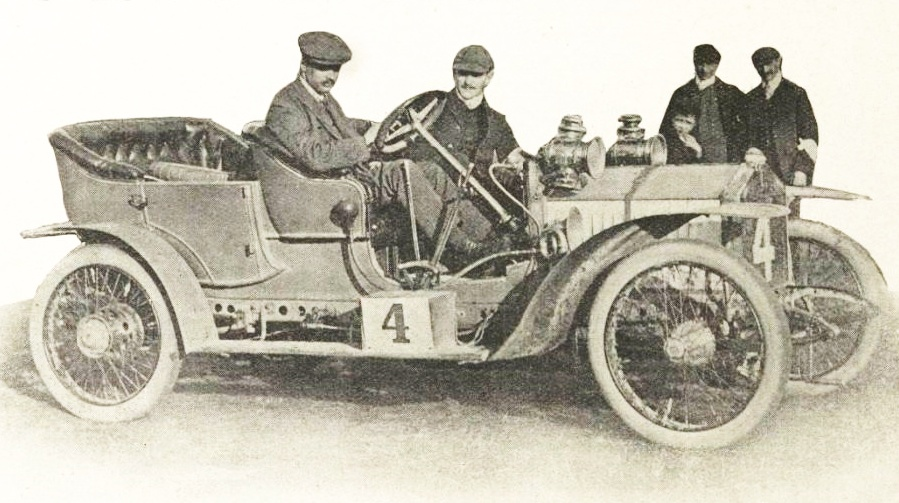 L'honorable C.S. Rolls, vainqueur du RAC Tourist Trophy 1906, La Vie au Grand Air, 13 octobre 1906, p.744